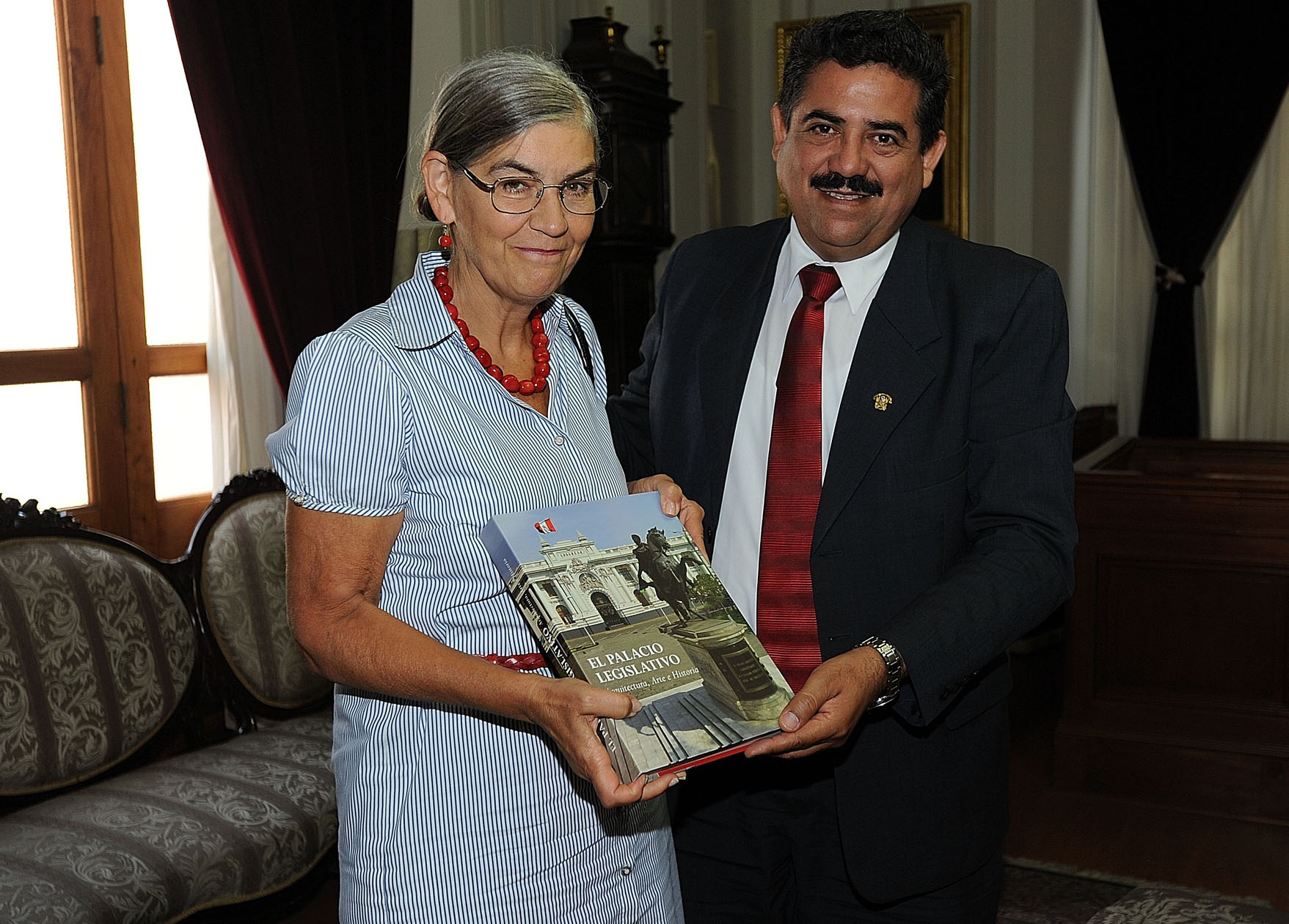 La embajadora de Suecia en la República de Chile, Eva Zetterberg, llegó hoy en visita protocolar al Congreso de la República. Fue recibida por el primer vicepresidente, congresista Manuel Merino De Lama, con quien enfocó diversos temas de interés bilateral.